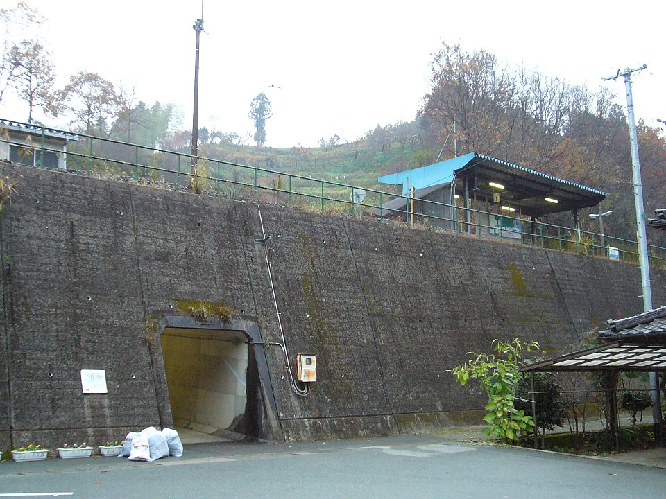 予讃線伊予立川駅 駅入口とホーム上屋